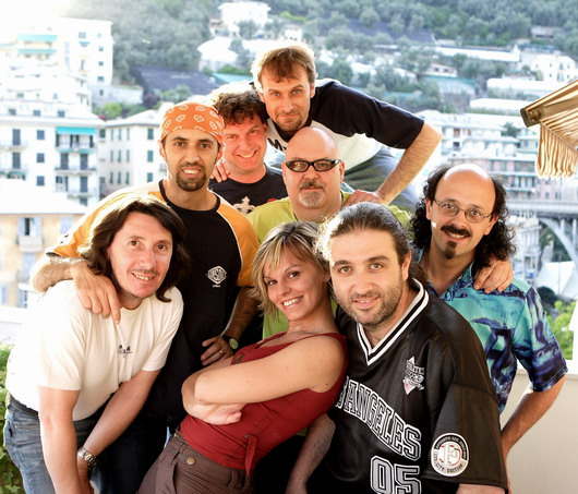 Immagine del gruppo musicale genovese dei Buio Pesto (2006)